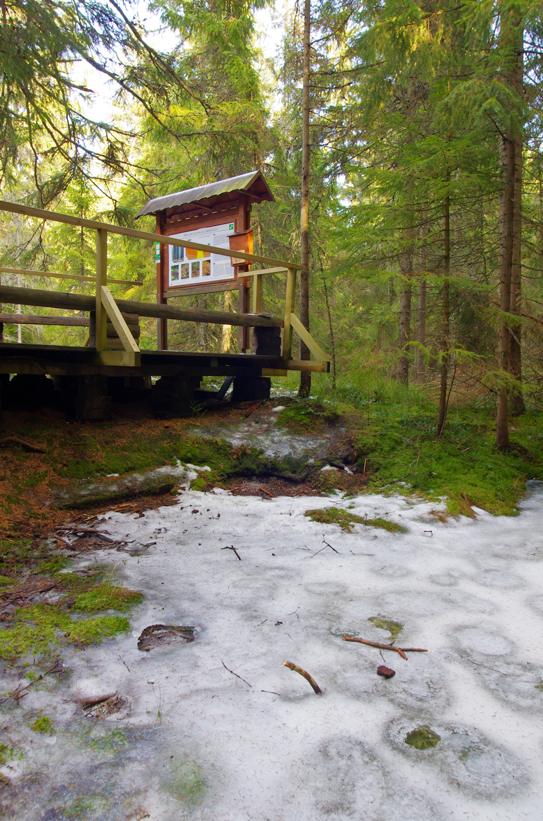 Přírodní rezervace Smraďoch ve Slavkovském lese, vlevo od silnice z obce Prameny do Mariánských Lázní, okres Cheb